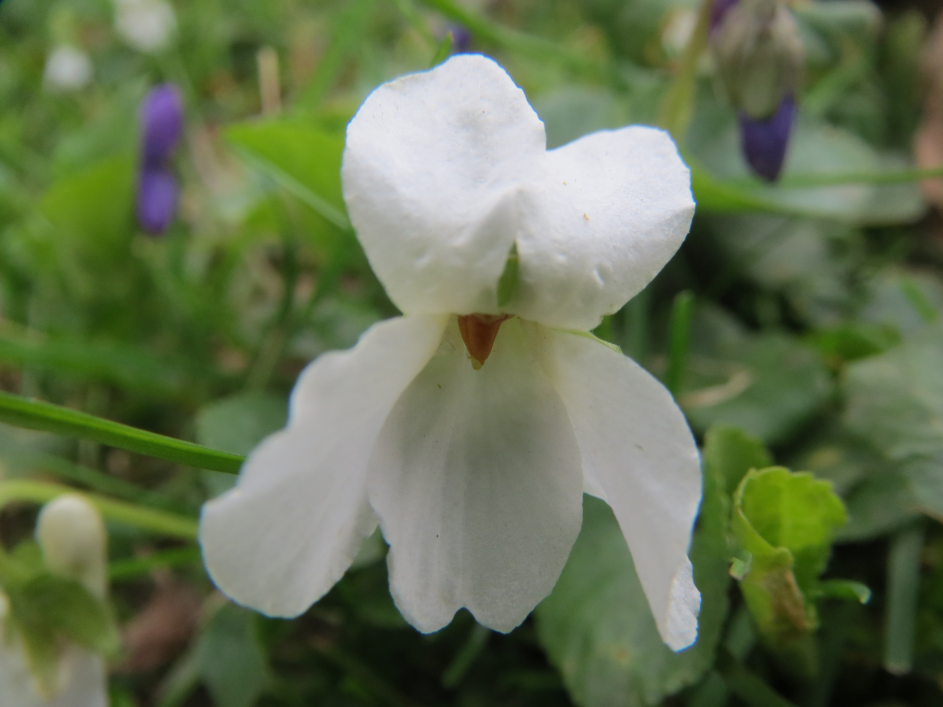 Duftveilchen (Viola odorata) an der Saar in Güdingen-Unner